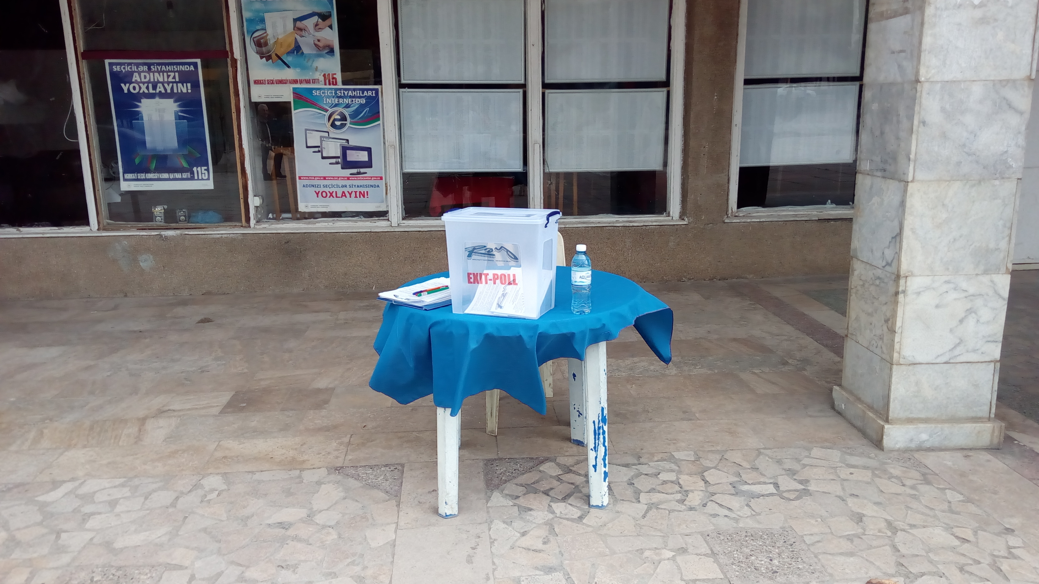 Referendum vaxtı Sumqayıtda Exit-poll